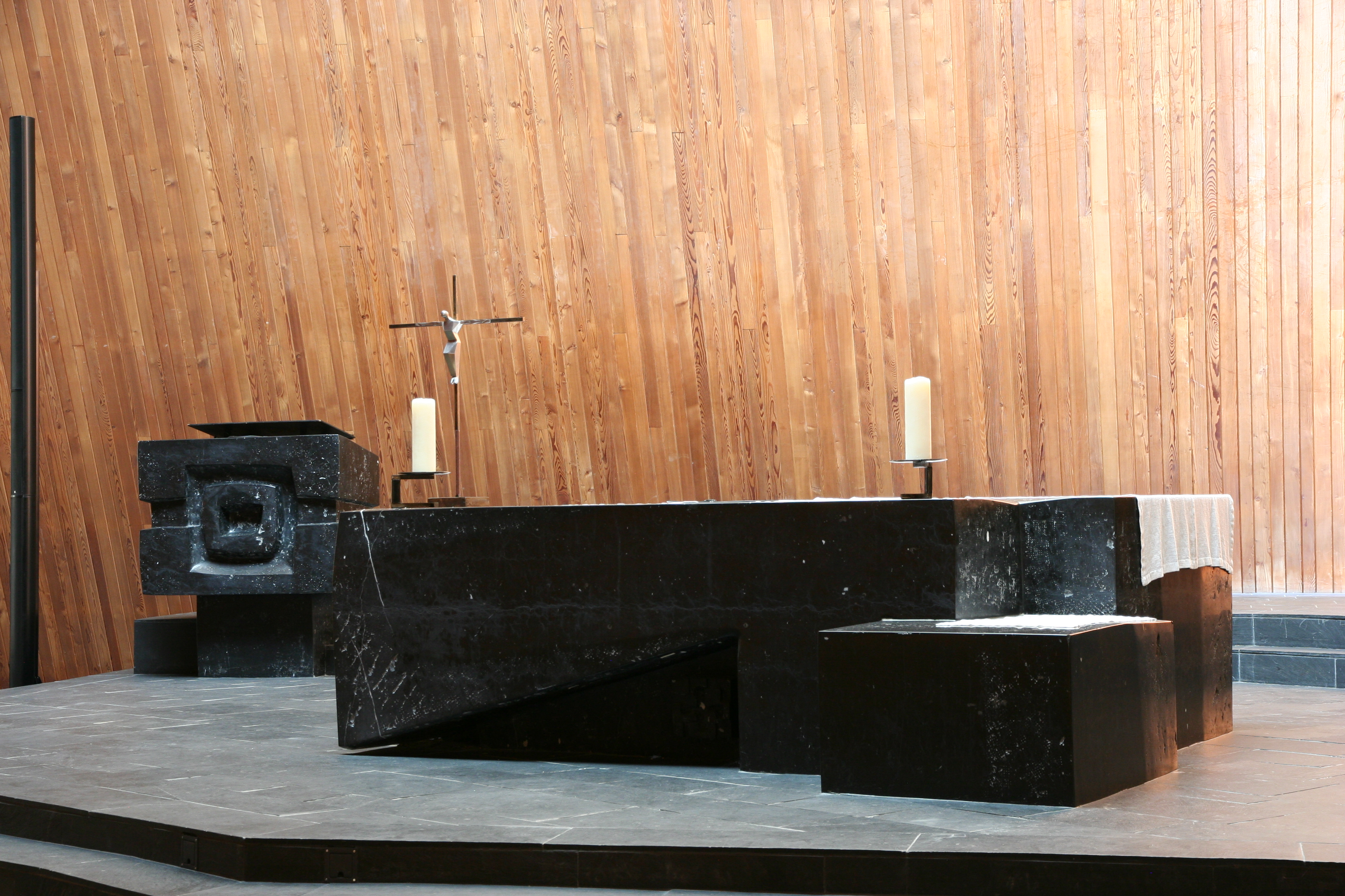 Römisch-katholische Pfarrkirche Maria Krönung Zürich-Witikon, Architektur von Justus Dahinden, Altarraum von Georg Malin